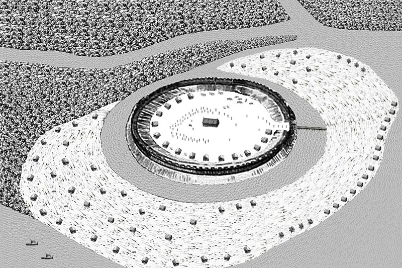 Slawische Burg Brandenburg, Rekonstruktionsversuch